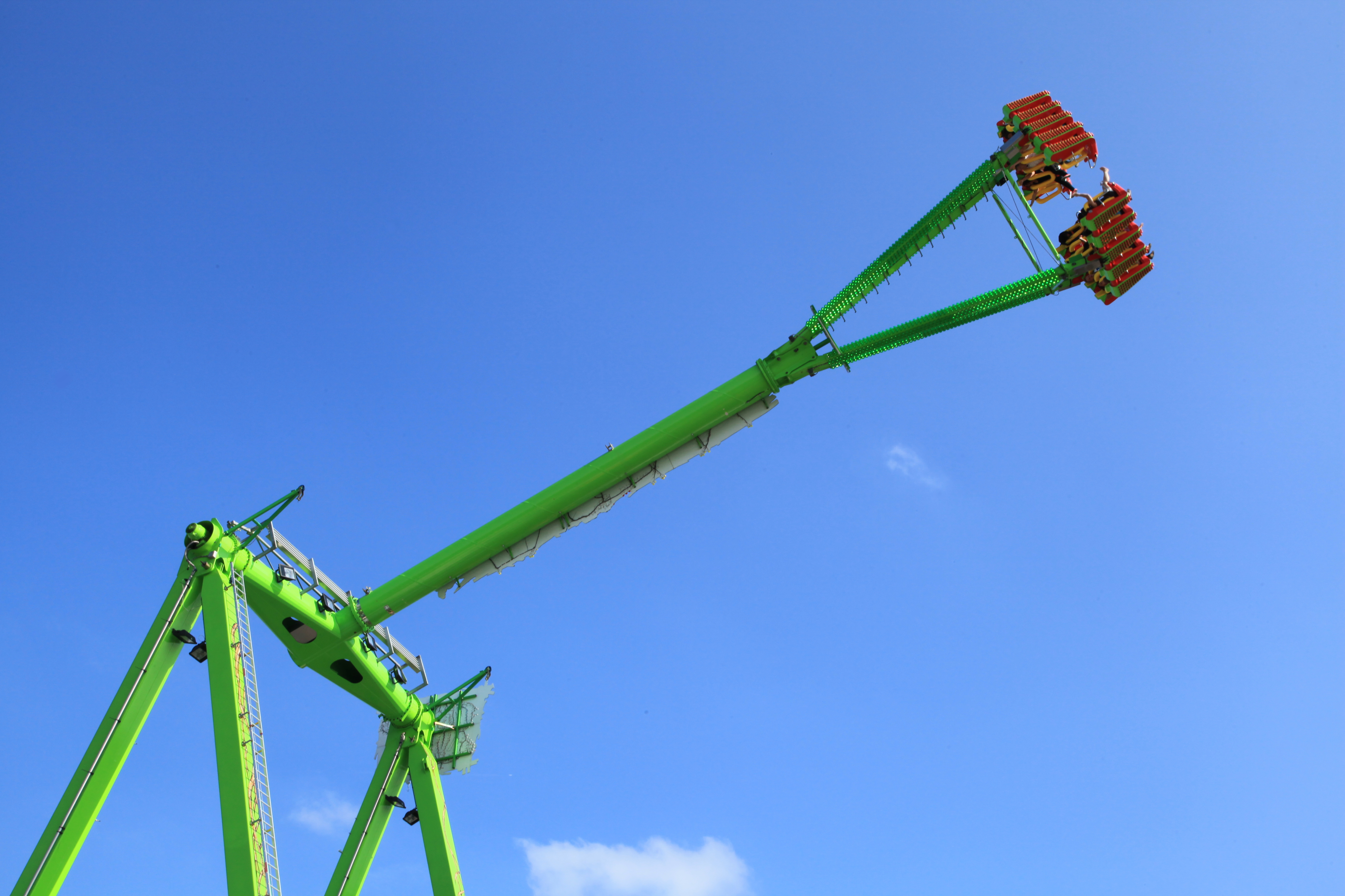 Cranger Kirmes 2012 in Herne-Crange